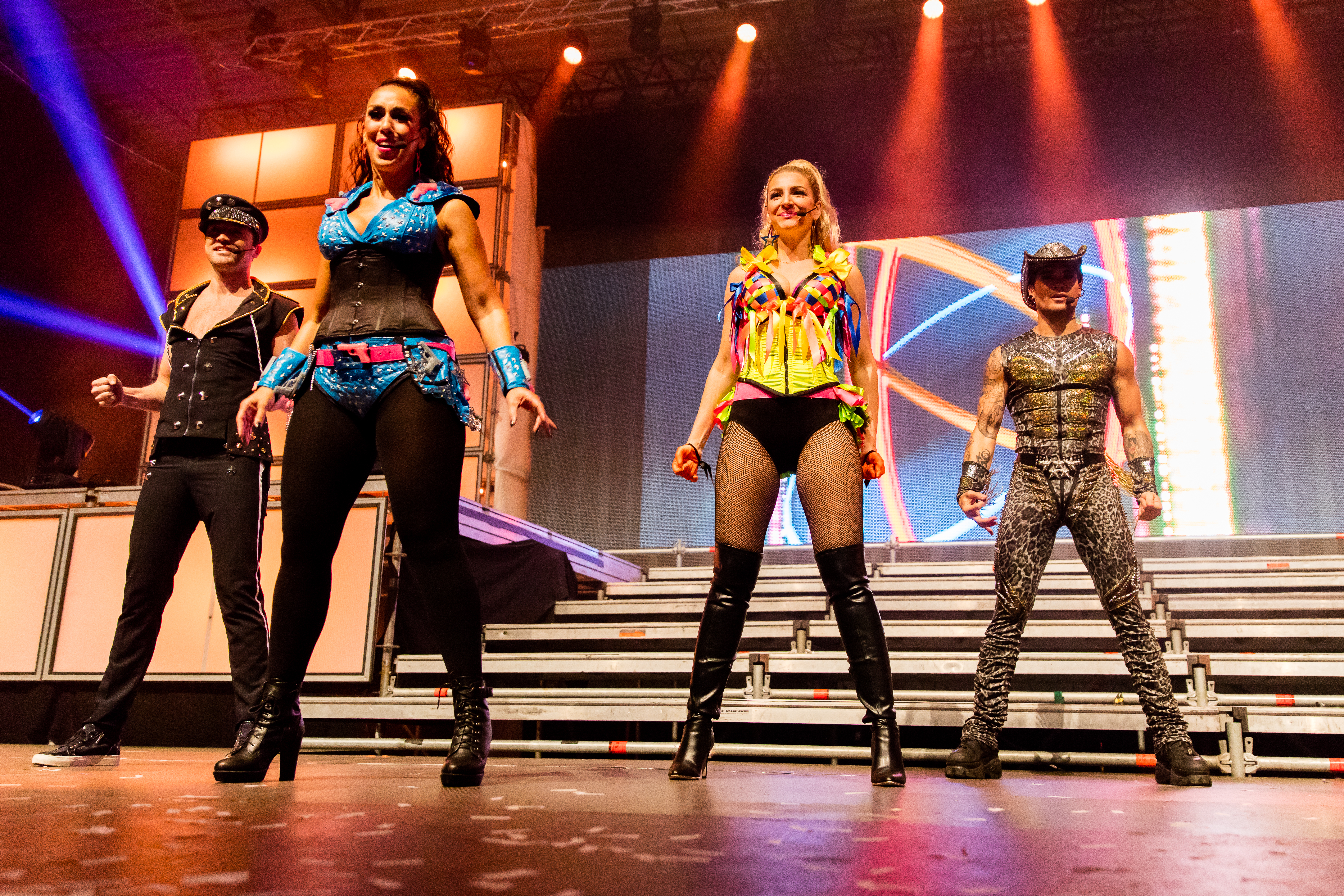 Vengaboys during sunshine live "Die 90er - Live on Stage" at Maimarkt Halle, Mannheim, Baden-Württemberg, Germany on 2015-11-28, Photo: Sven Mandel